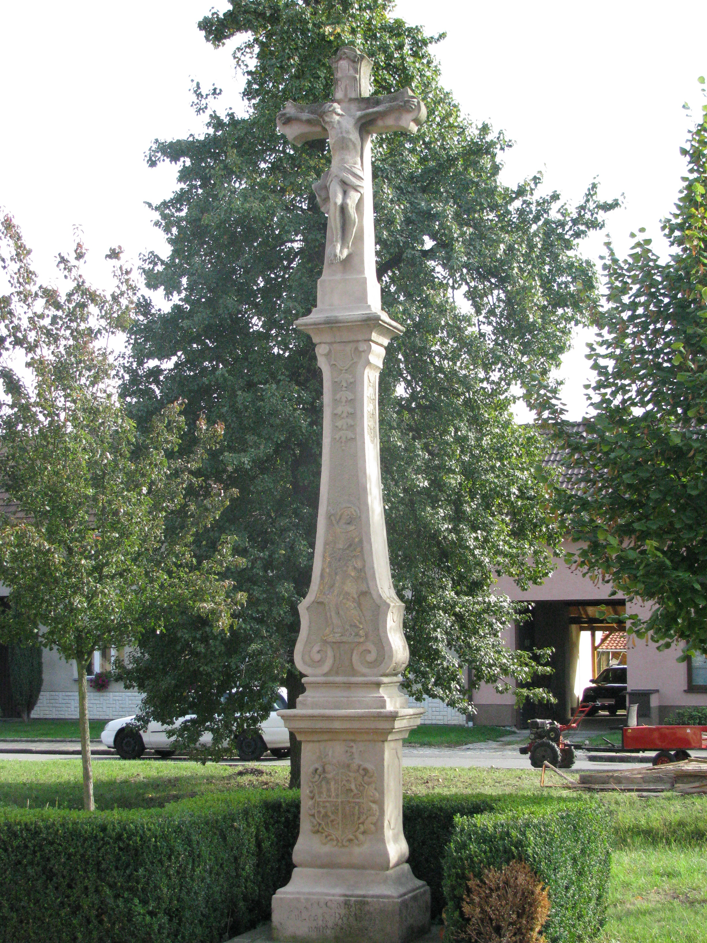 Kříž (Zlín), náves, Zlín